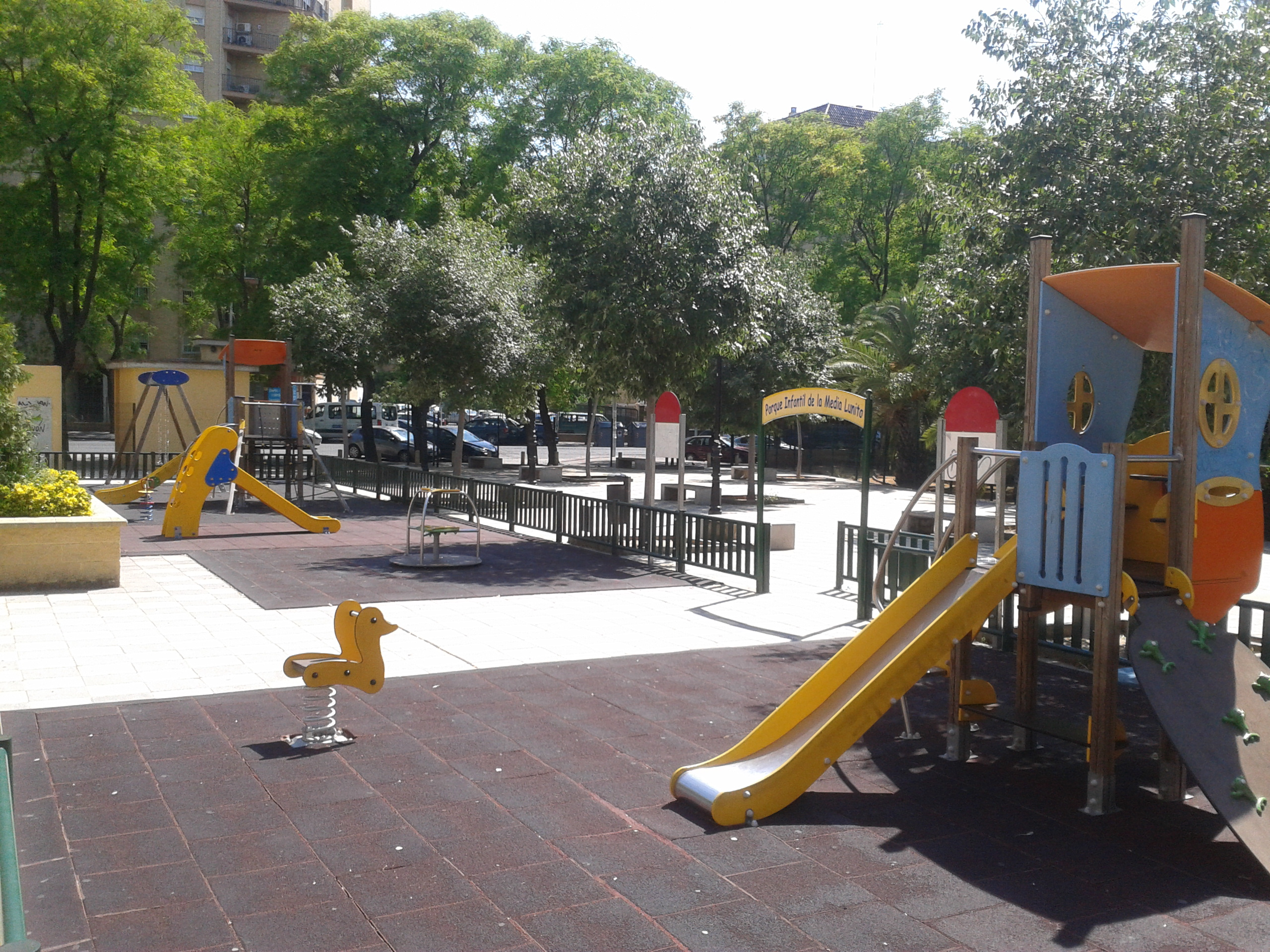 Sevilla Parque Media Lunita